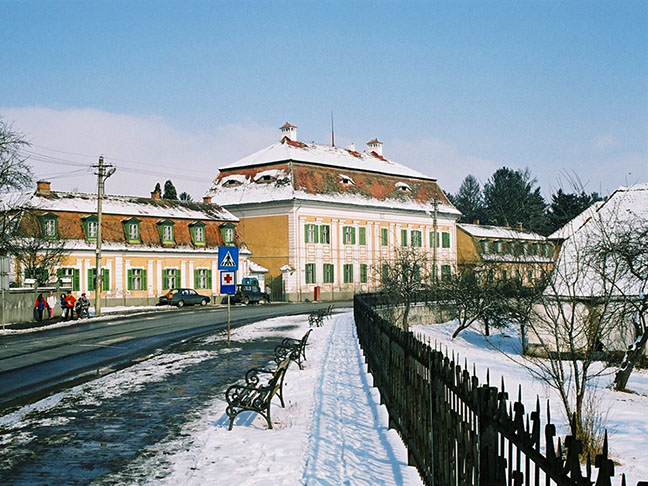 Brukenthal-Schloss in Freck. 01